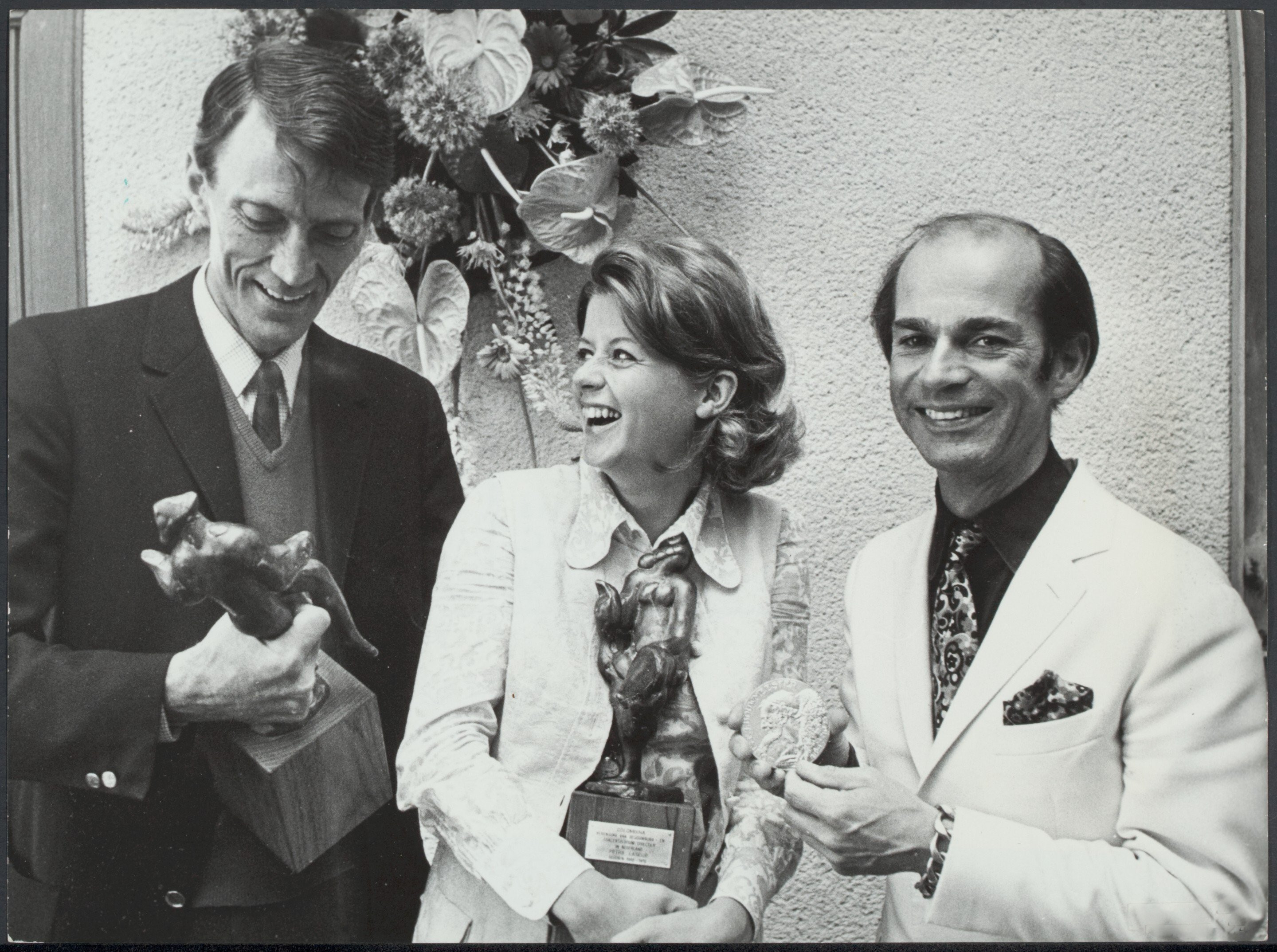 Van links naar rechts prijswinnaars van het Holland Festival; Frans van der Lingen met de Arlecchino, Petra Laseur met de Colombine, en Henk van Ulsen met de Louis d'Or